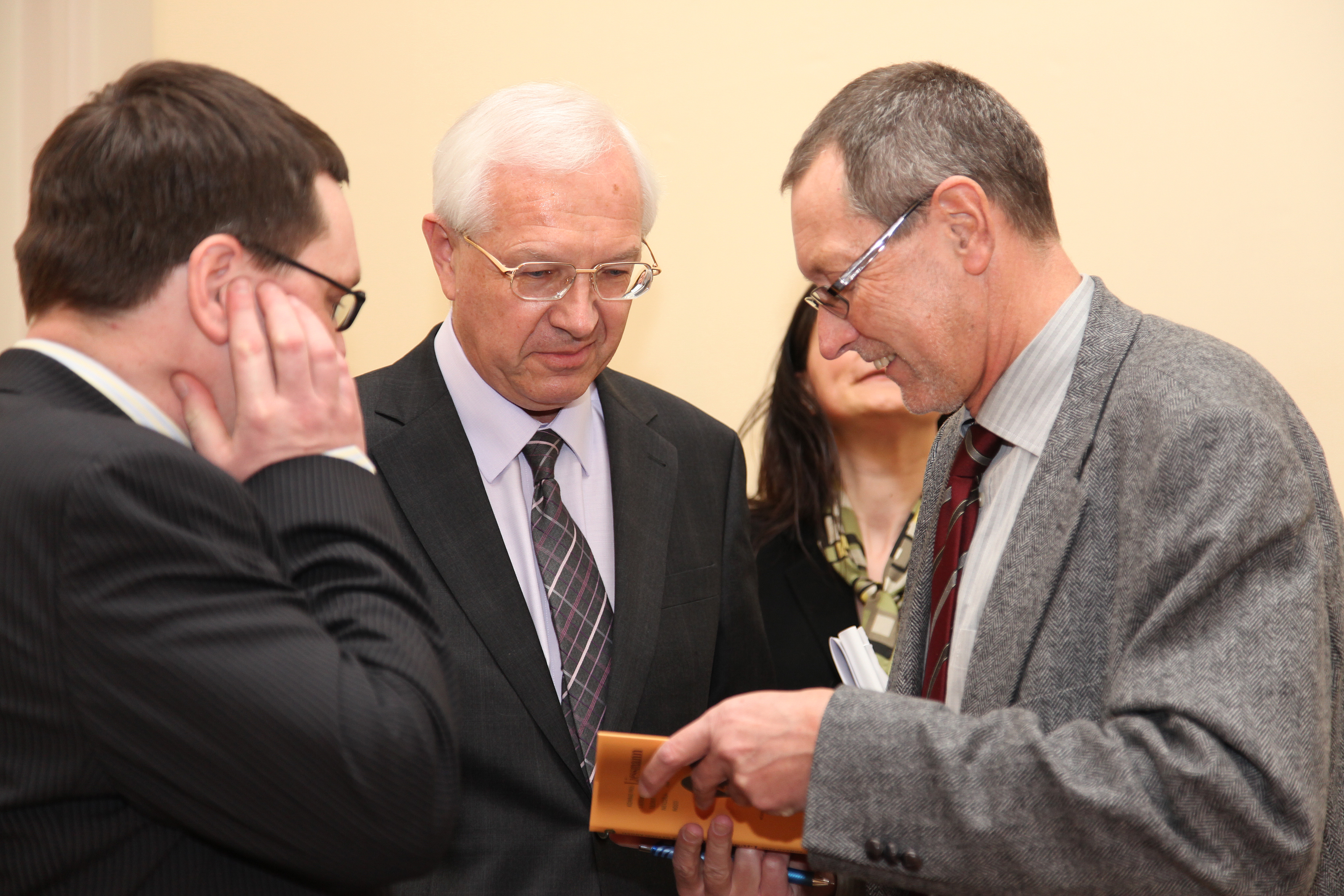 Petr Hlaváček, předseda Akademie věd ČR Jiří Drahoš a rakouský filosof Konrad Paul Liessmann (2010)